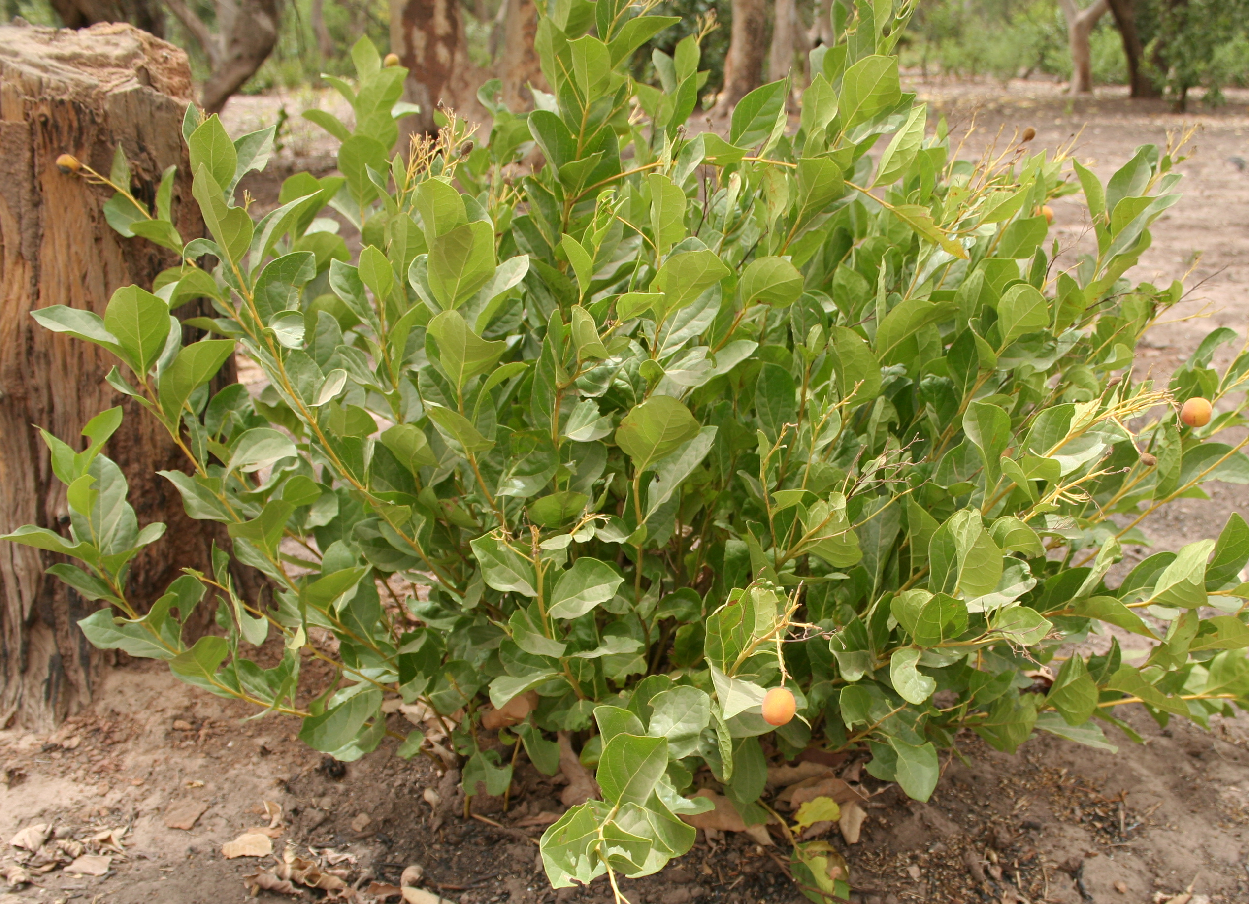 Icacina oliviformis (syn. Icacina senegalensis), F.Cl. de Patako, Senegal